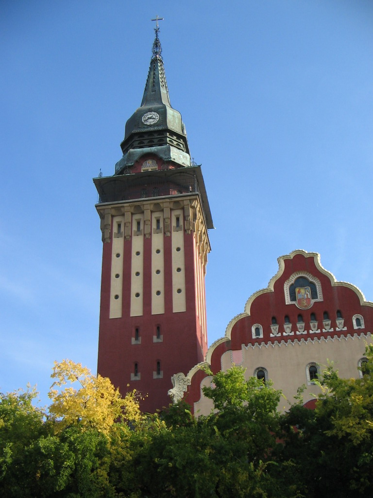 Toranj gradske kuće